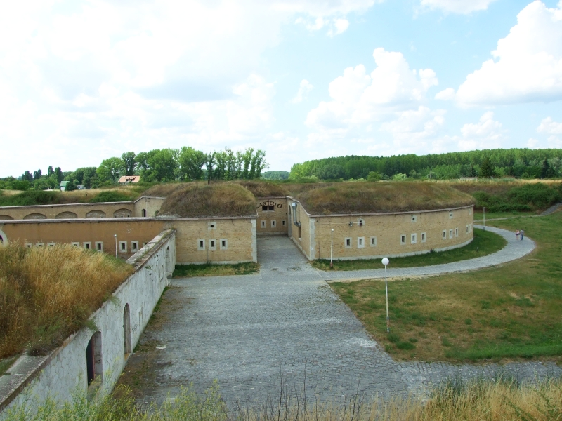 Bastion No. VI of the Komárno fortification system Bašta č. VI Fortifikačného systému v Komárne